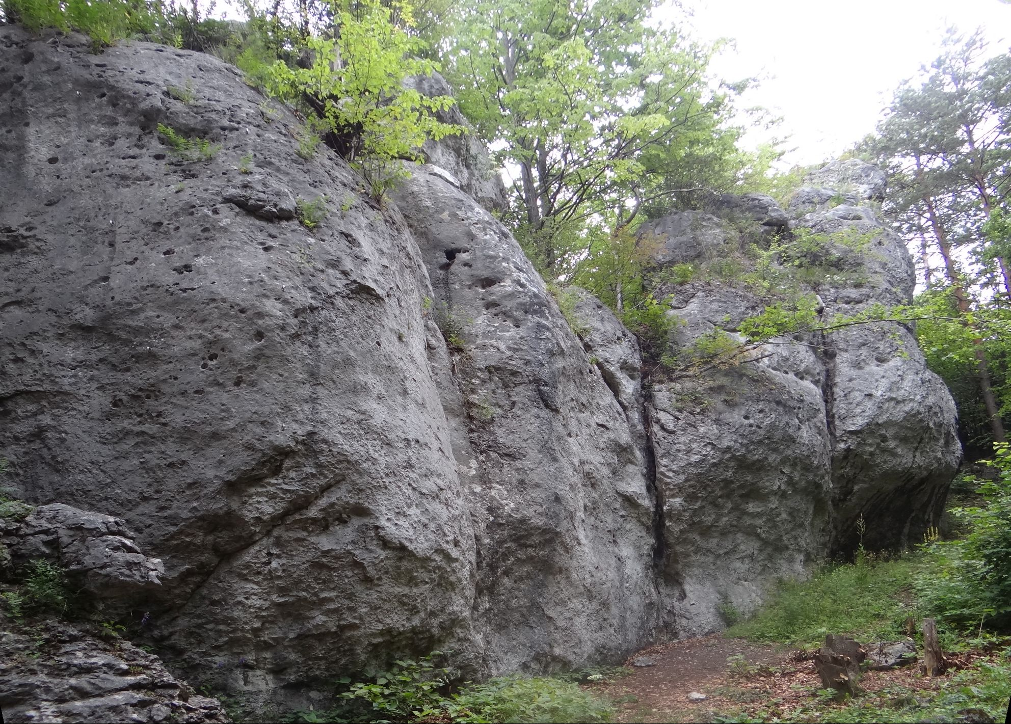 Skała Brzuszki Buddy na wzniesieniu Kołoczek w Podlesicach